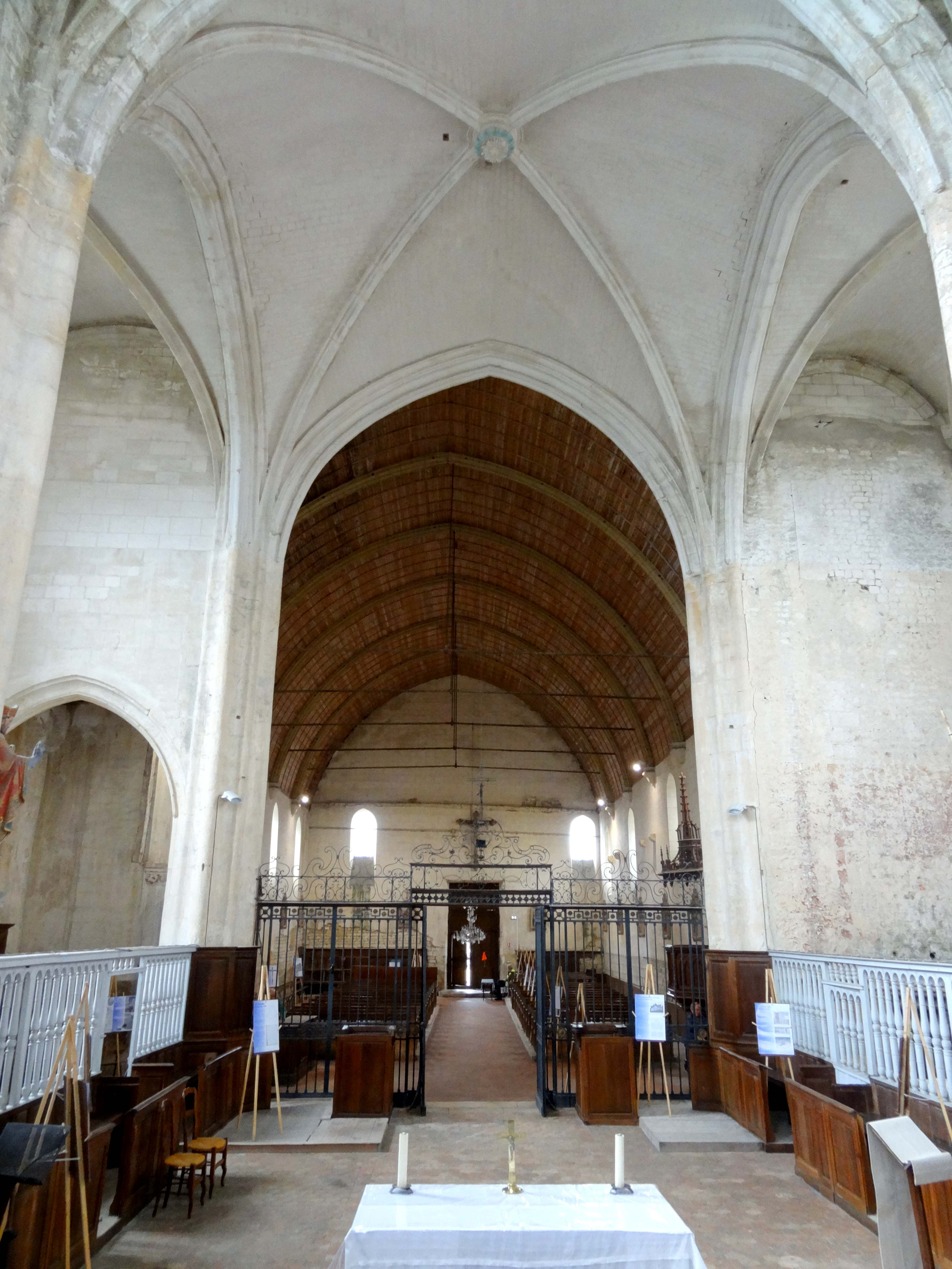 Intérieur de l'église - voir titre.